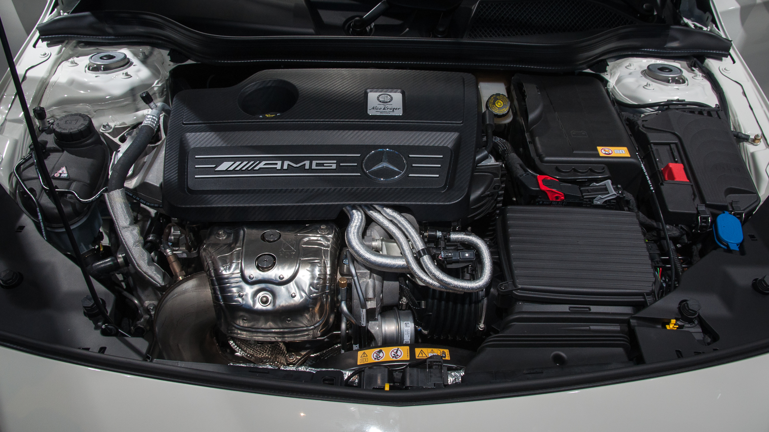 Mercedes-Benz Motor 133 im Typ 176